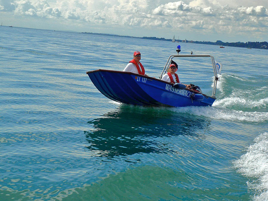 Beifahren am fahrenden Boot.